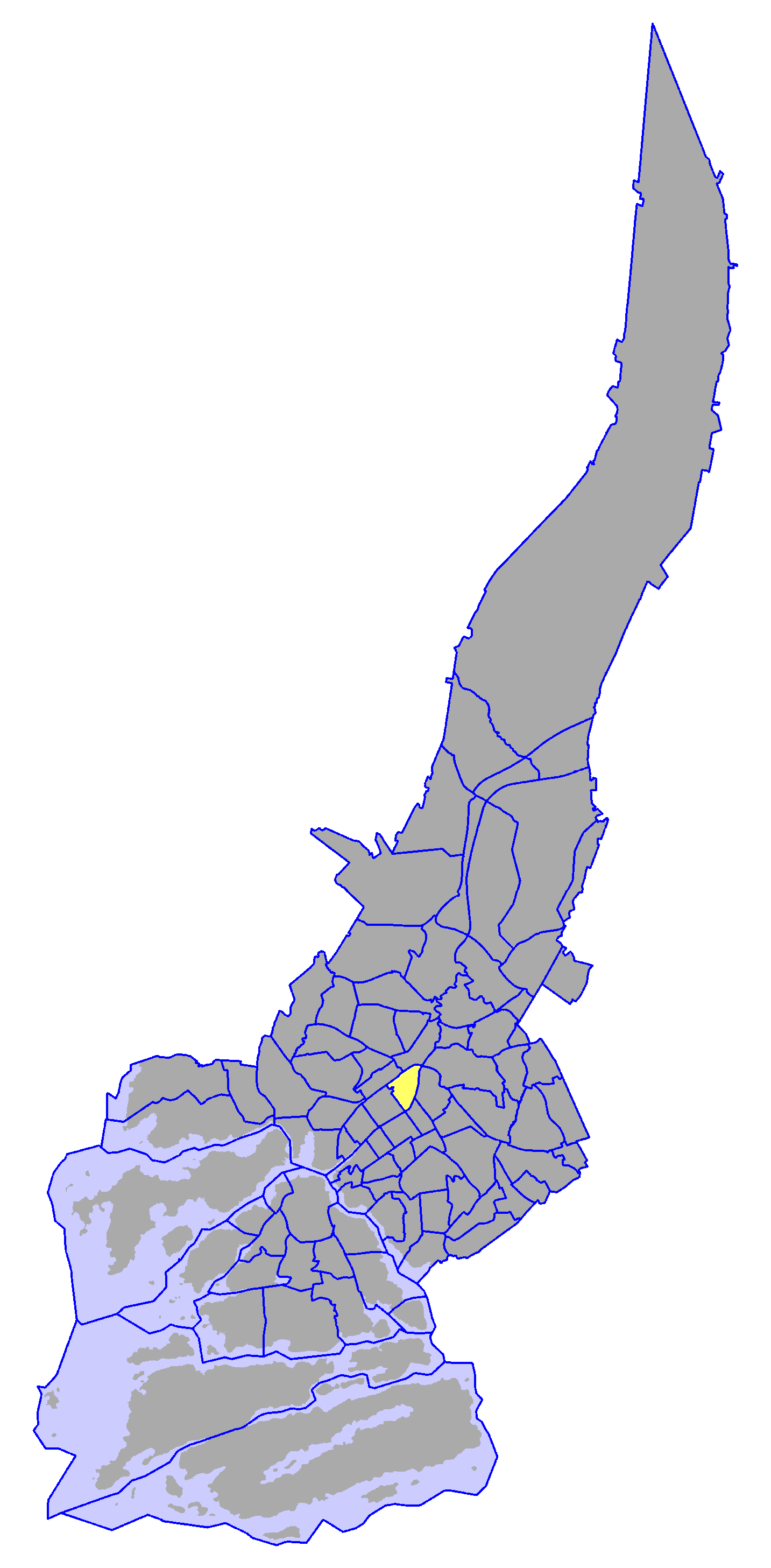 District number VI, in Turku